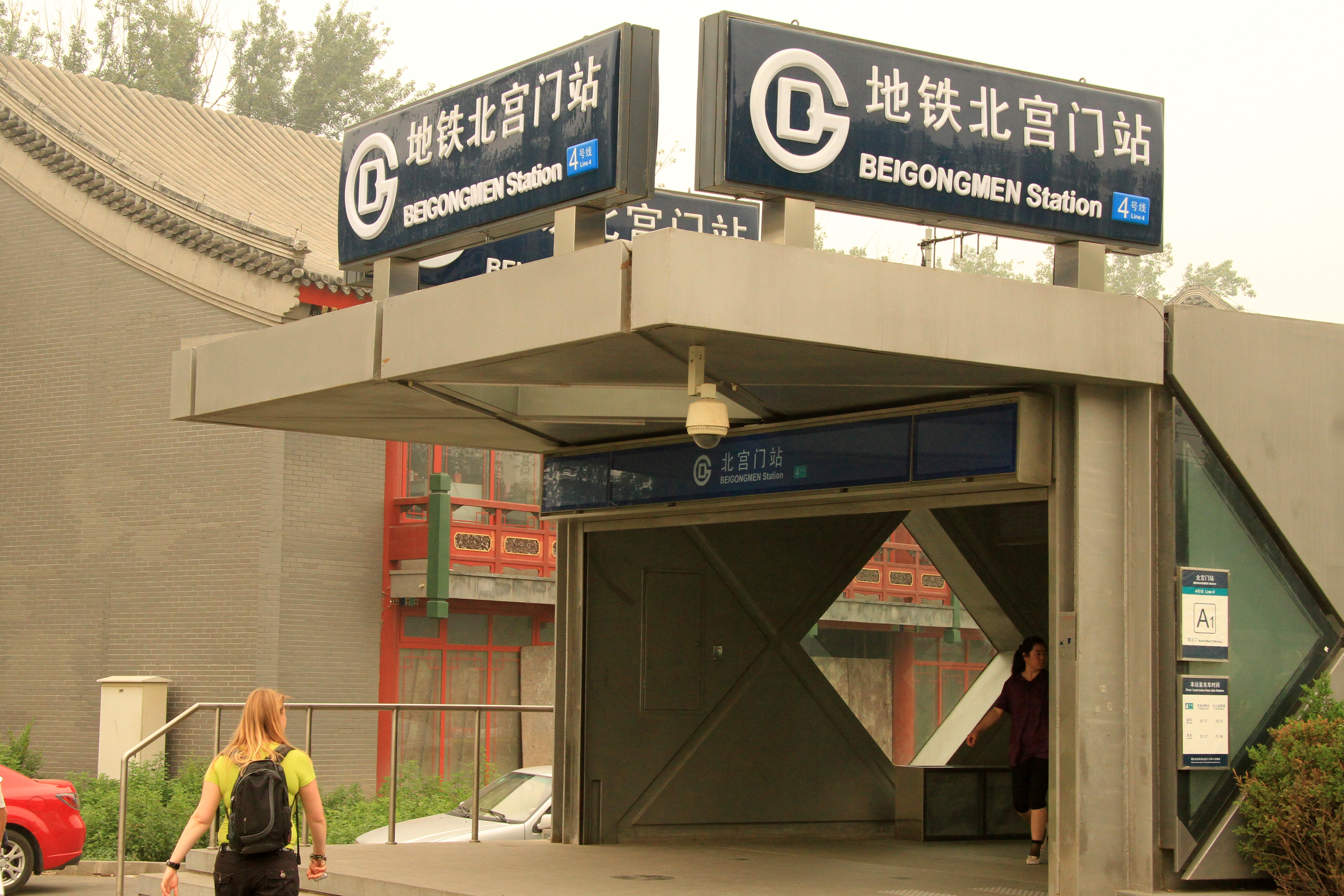 Beijing Underground